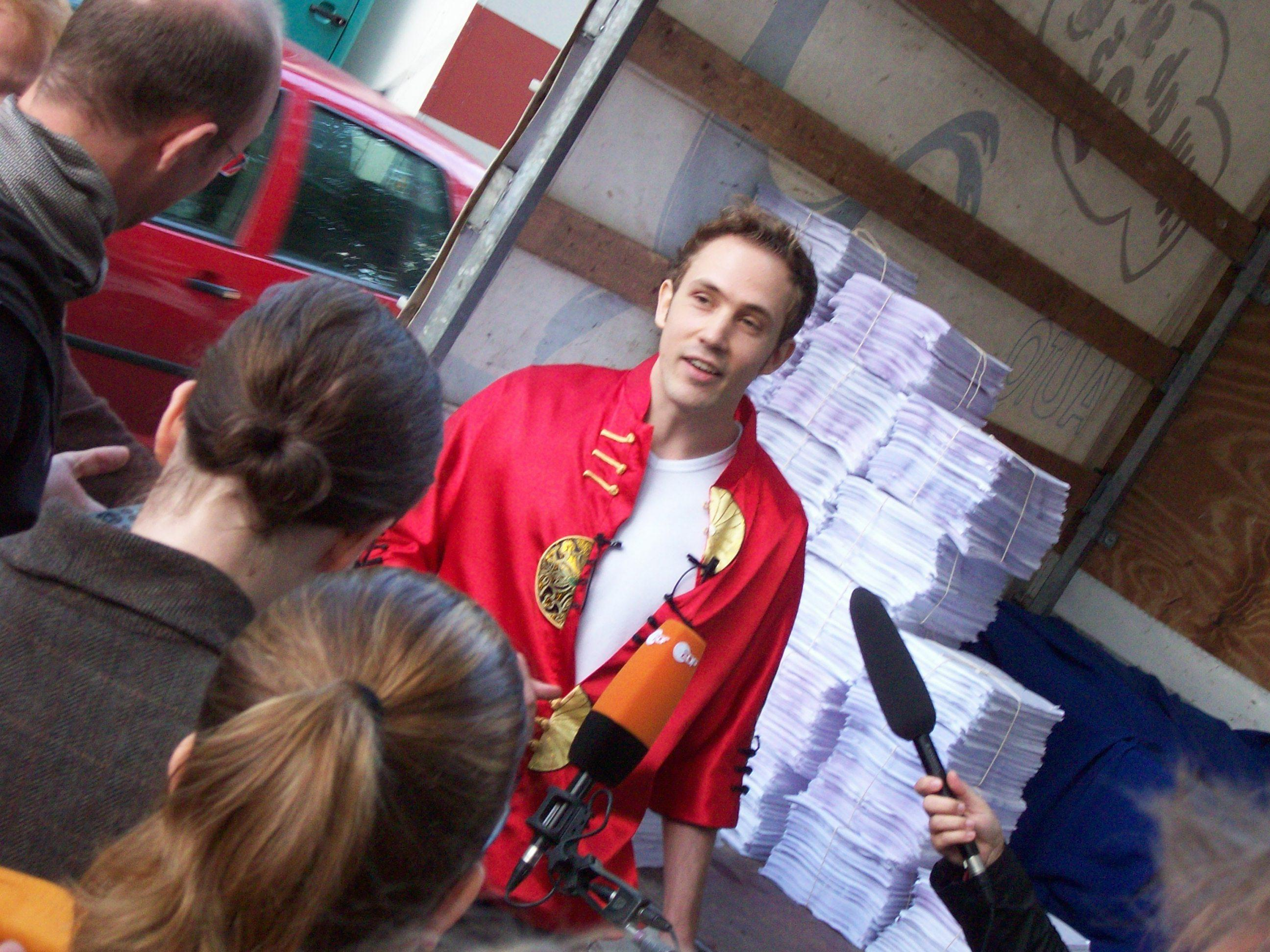 Komponist und Aktionskünstler Johannes Kreidler bei der Aktion Product Placements